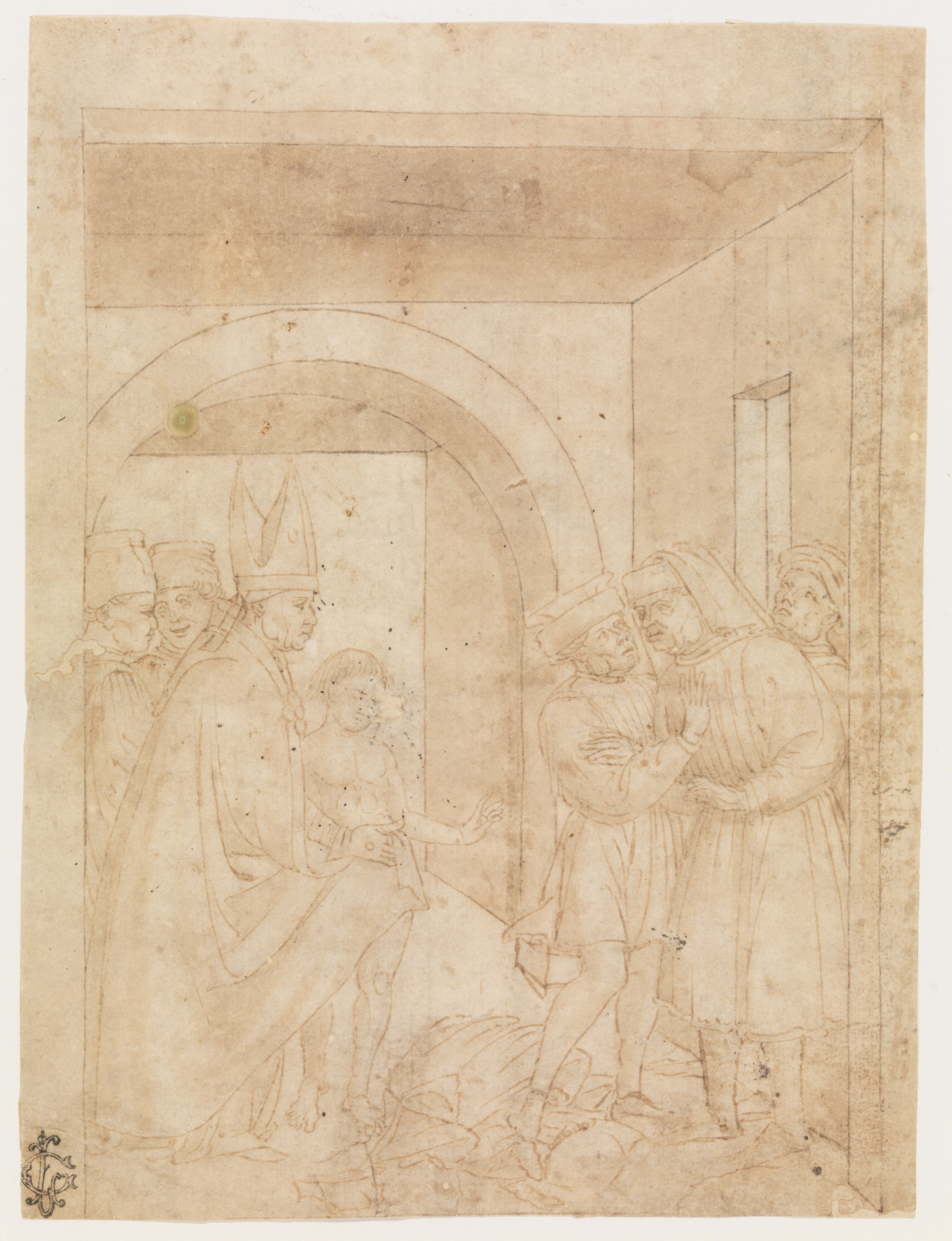 Drawing; Drawings